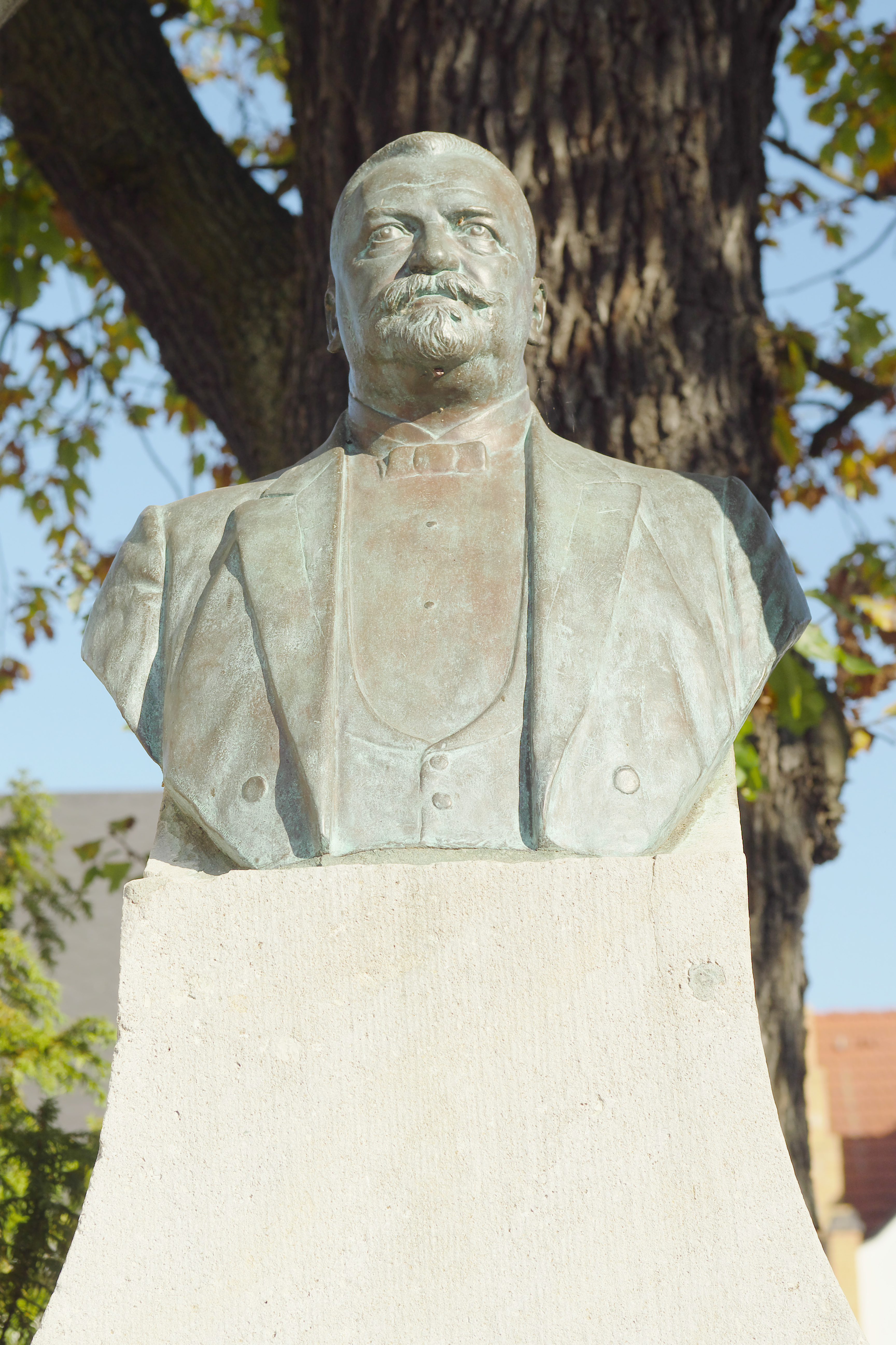 Bronzebüste von Ernst von Stubenrauch in Teltow